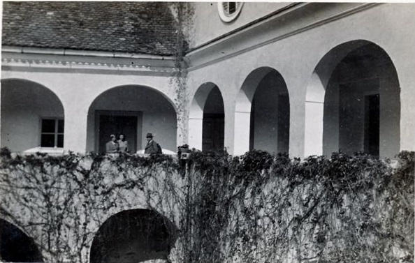 Grad Raka